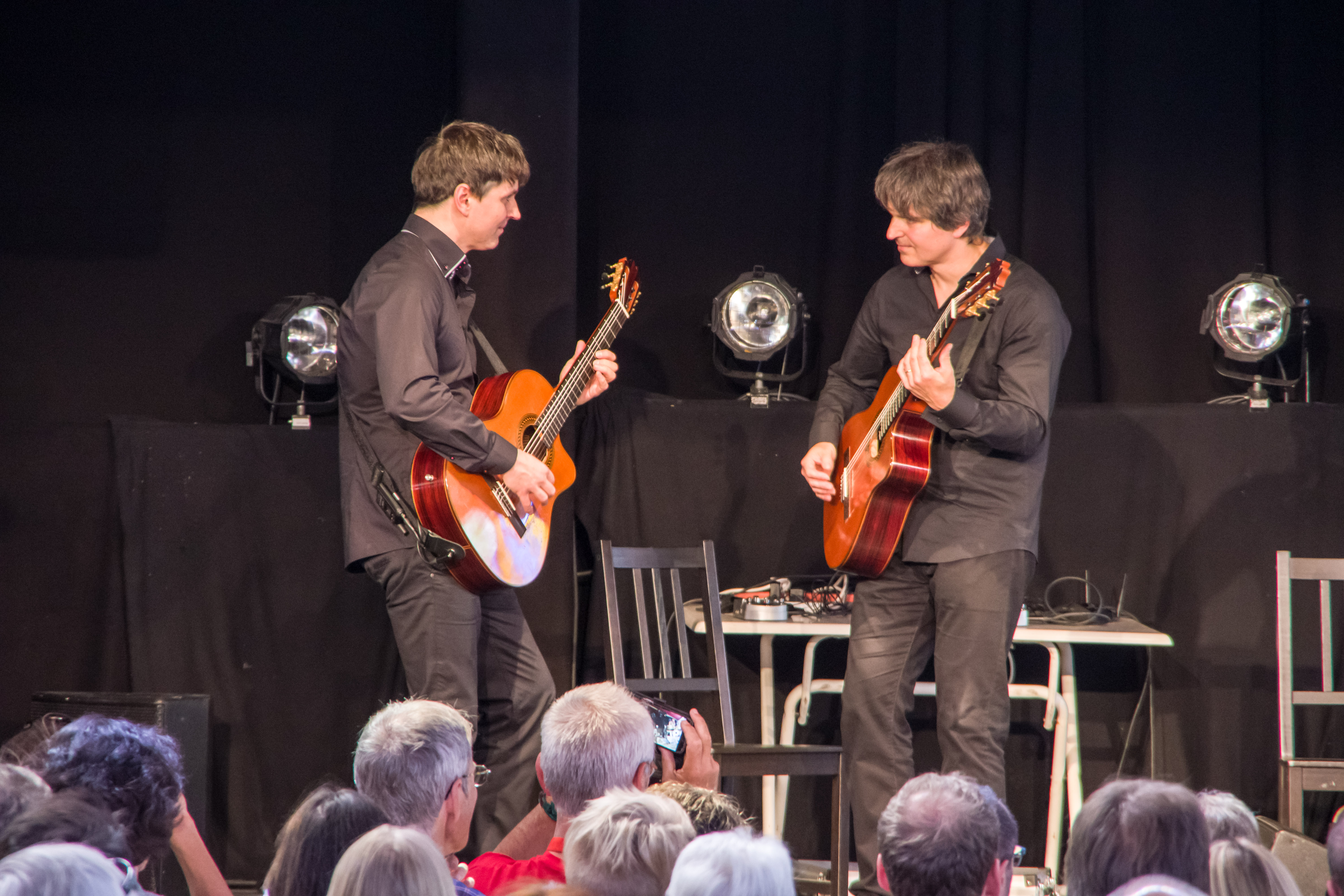 Das Zelt-Musik-Festival 2017 in Freiburg im Breisgau Klassik-Matinée am 16.07.2017 Katona Twins